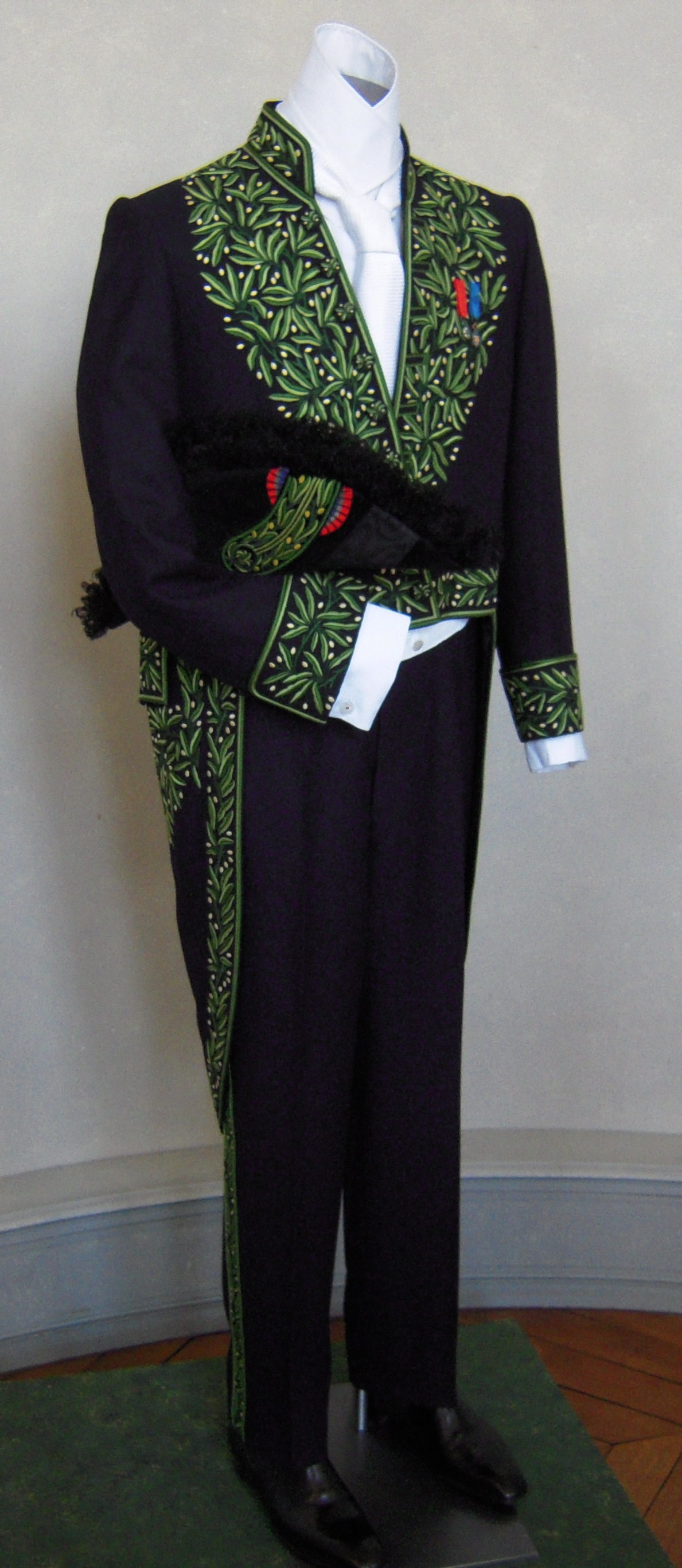 Habit vert des membres de l'Institut